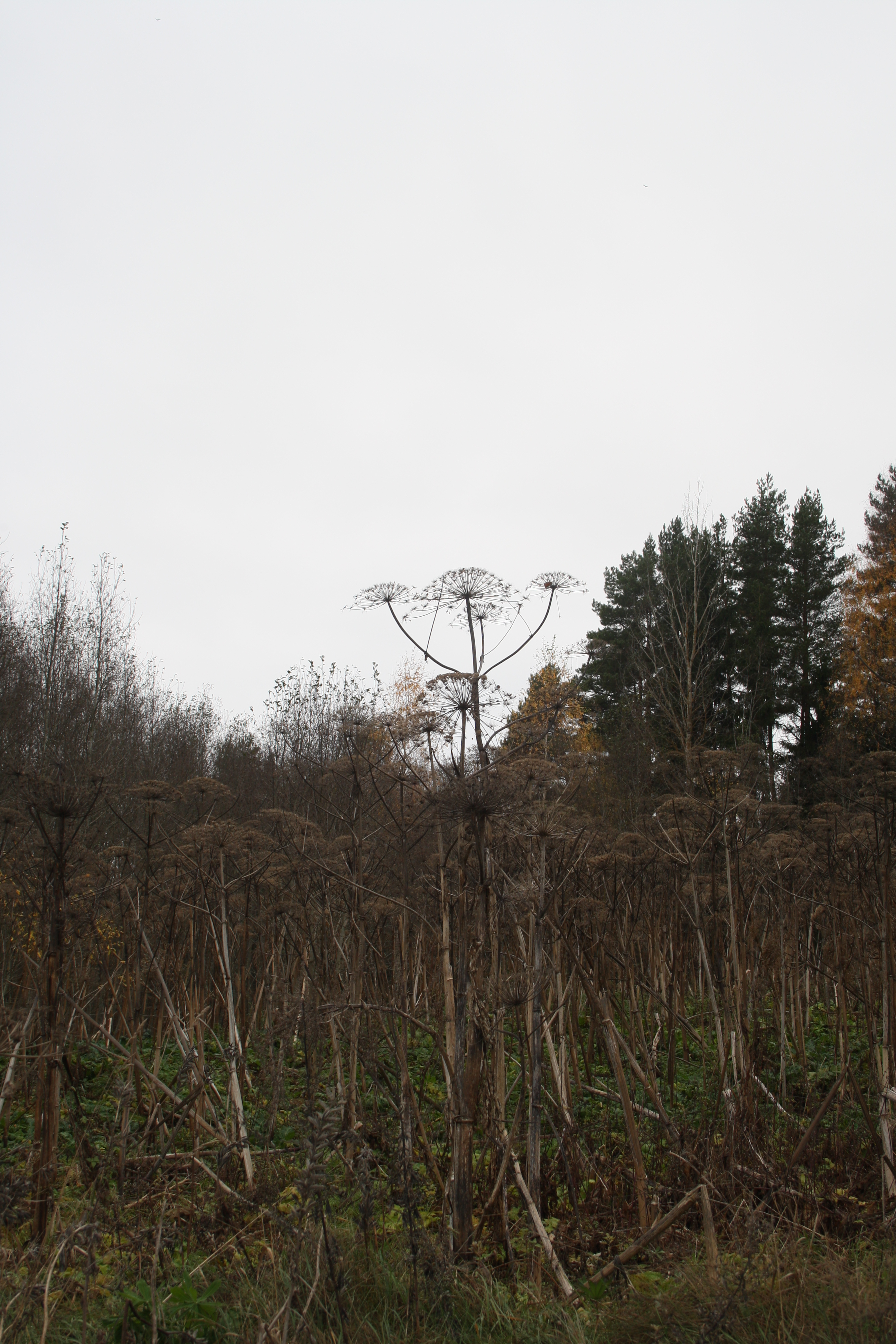 bereklauw